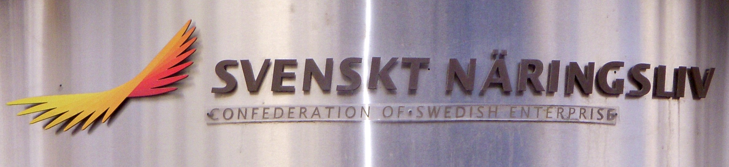 Svenskt Näringsliv, skylt